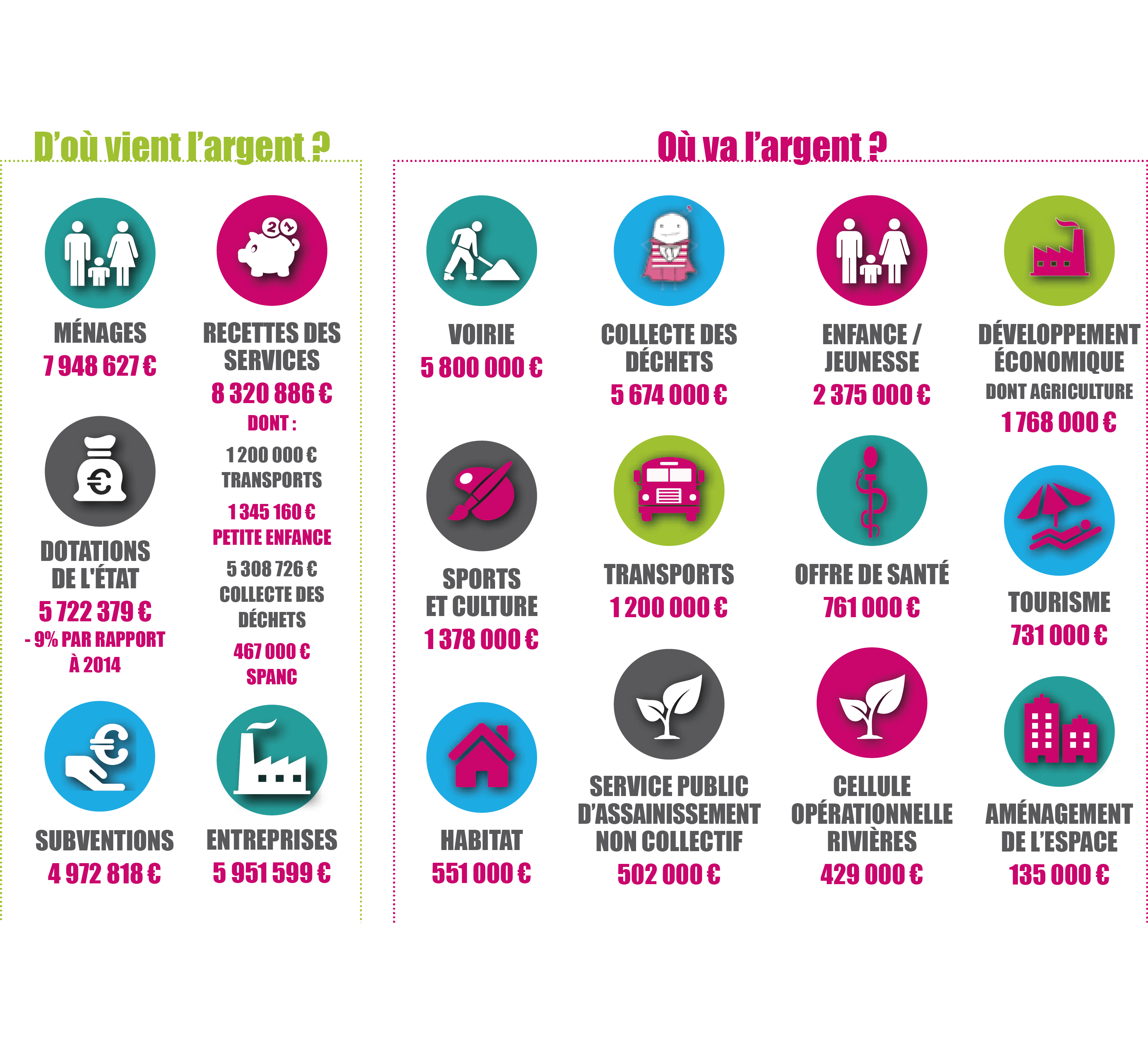 Représentation du budget : D'où vient l'argent et Où va l'argent